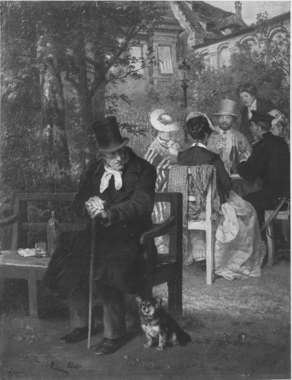 Der Hypochonder